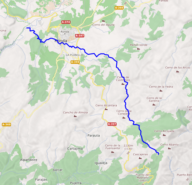 carte réalisée sur umap This map may be incomplete, and may contain errors. Don't rely solely on it for navigation.